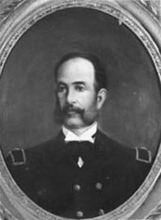 Obra da coleção Brasiliana Iconográfica.